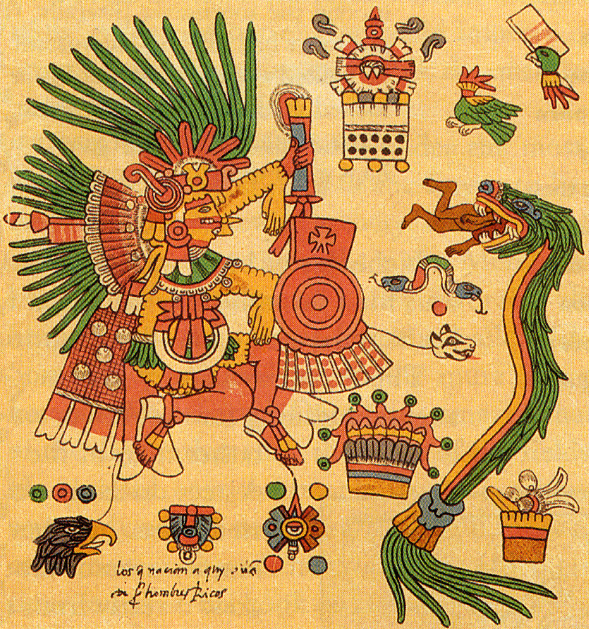 Imagem de Xipe Totec no calendário Tonalamatl de 260 dias.